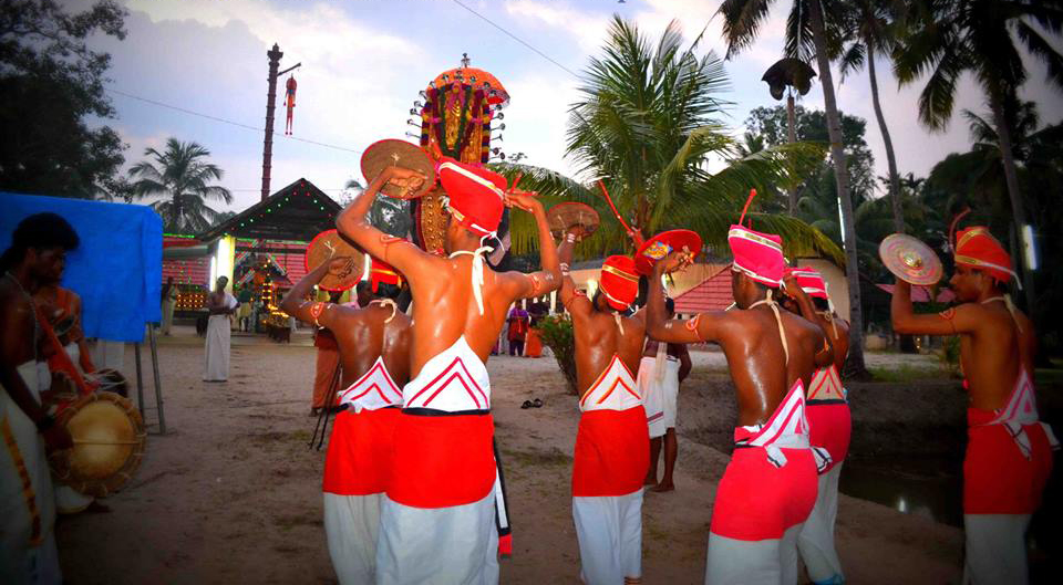 കൊടിയേറ്റ് ഉത്സവം